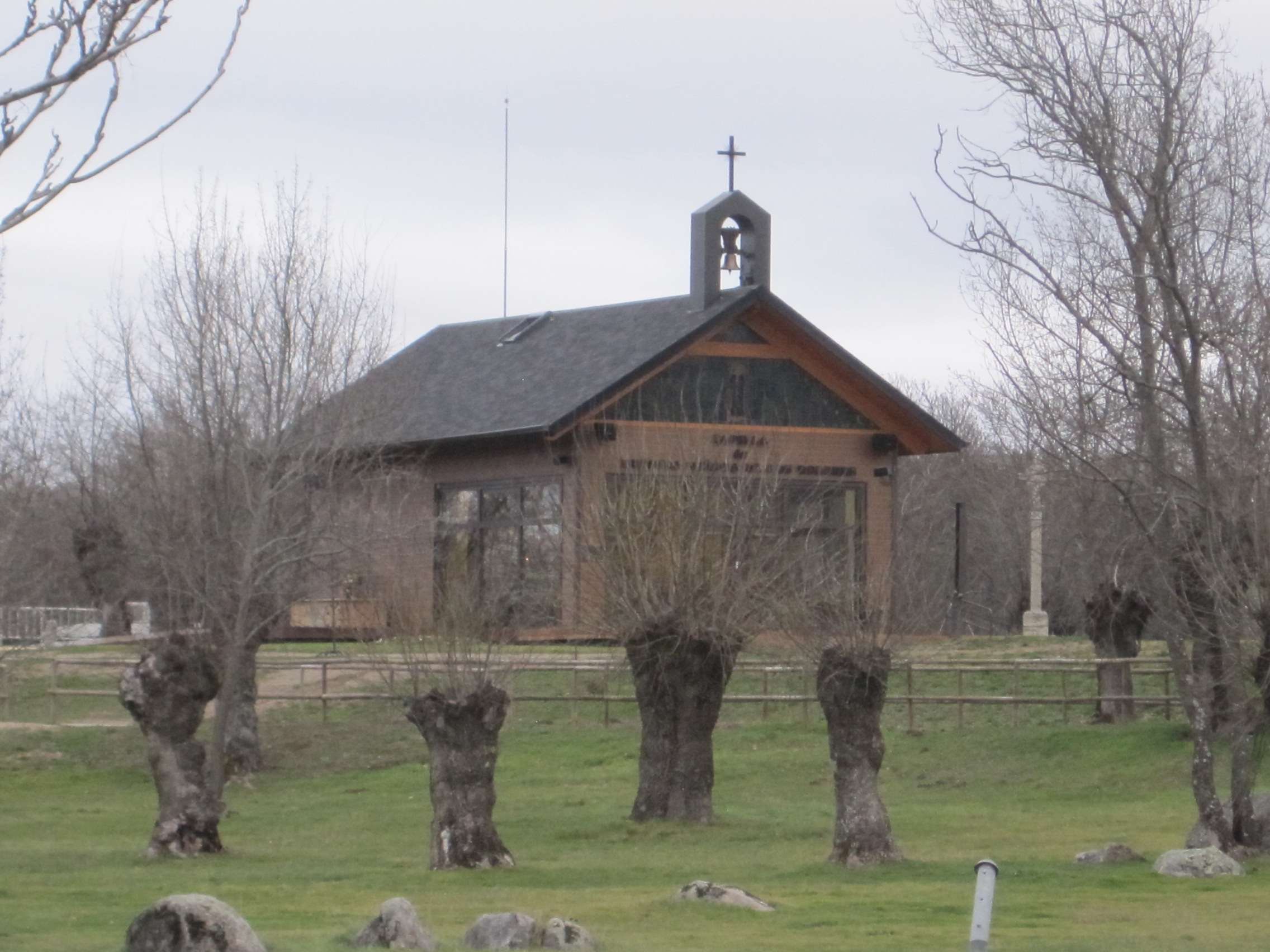 Capilla de Prado Nuevo, en El Escorial (Madrid, España).